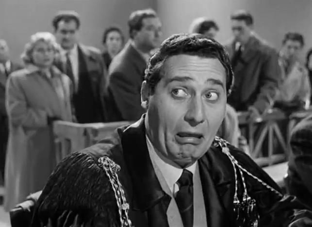 Alberto Sordi in Buonanotte... avvocato! (1955)